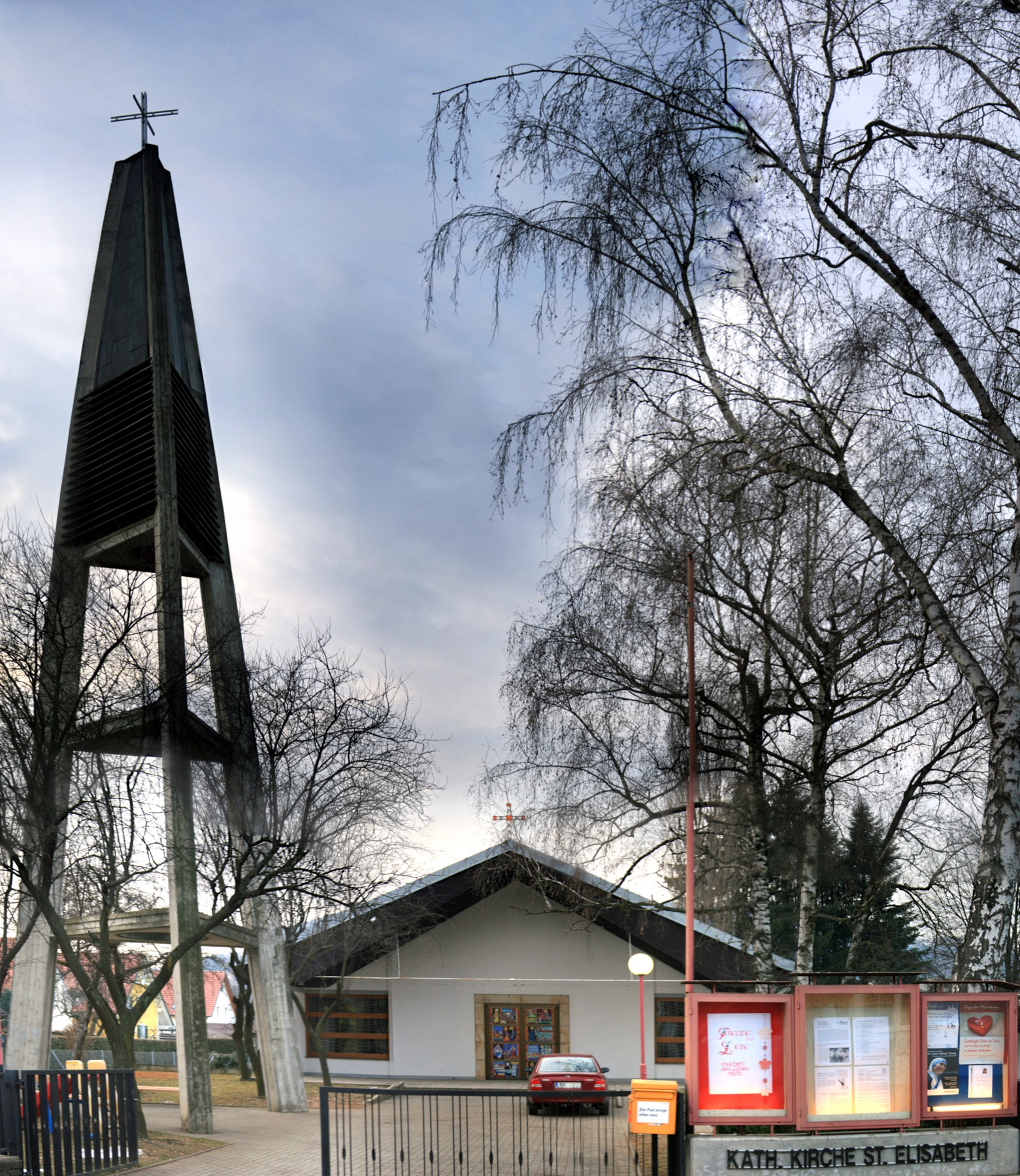 Graz Elisabethkirche (stitch)